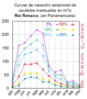 Curvas de variación estacionale del río Renaico en Panamericana. # Dirección General de Aguas # Diagnóstico y clasificación de los cursos y cuerpos de agua según objetivos de calidad. Cuenca del río Biobío. # Santiago de Chile # Ministerio de Obras Públicas (Chile) # 2004 # url: # urlarchivo: # Tabla 4.15: Estación Renaico en Panamericana pág. 87 mes 5% 10% 20% 50% 85% 95% abr 36.11 27.58 19.90 10.67 4.95 3.15 may 158.59 119.78 85.02 43.58 18.25 10.38 jun 169.18 149.01 126.76 90.11 53.83 36.27 jul 195.36 164.44 133.46 89.55 54.79 41.05 ago 217.84 180.65 144.00 93.36 54.74 40.01 sep 205.29 161.75 121.19 69.79 35.36 23.72 oct 84.43 74.44 63.67 46.53 30.42 22.97 nov 59.88 51.30 42.35 28.84 16.84 11.39 dic 67.86 49.10 33.57 17.15 8.77 6.59 ene 22.90 19.72 16.40 11.38 6.93 4.91 feb 27.21 20.13 14.32 8.26 5.23 4.46 mar 13.00 11.33 9.59 6.96 4.63 3.57 This plot was created with Gnuplot.